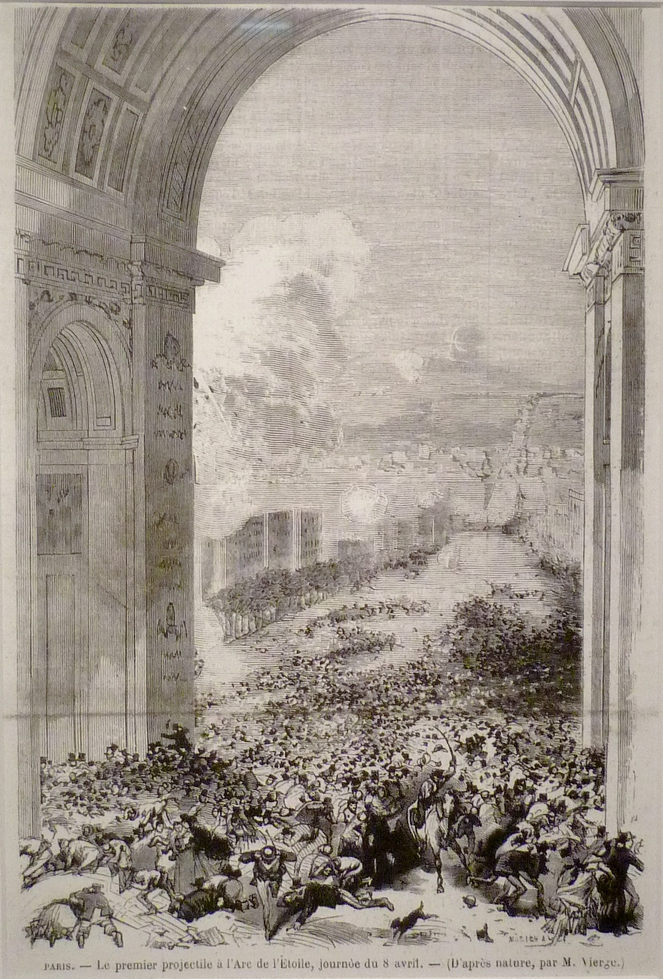 Exposition La Commune de Paris à l'Hôtel de Ville de Paris (18 mars - 28 mai 2011) - 8 avril, des obus touchent l'Arc de Triomphe provoquant la panique des parisiens - Gravure de Daniel Vierge pour Le Monde illustré du 15 avril 1871 - Bibliothèque historique de la Ville de Paris.